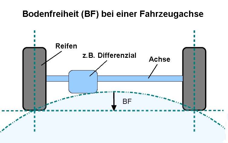 Das Bild zeigt die geometrische Definition des Begriffes Bodenfreiheit, bezogen auf eine Fahrzeugachse.